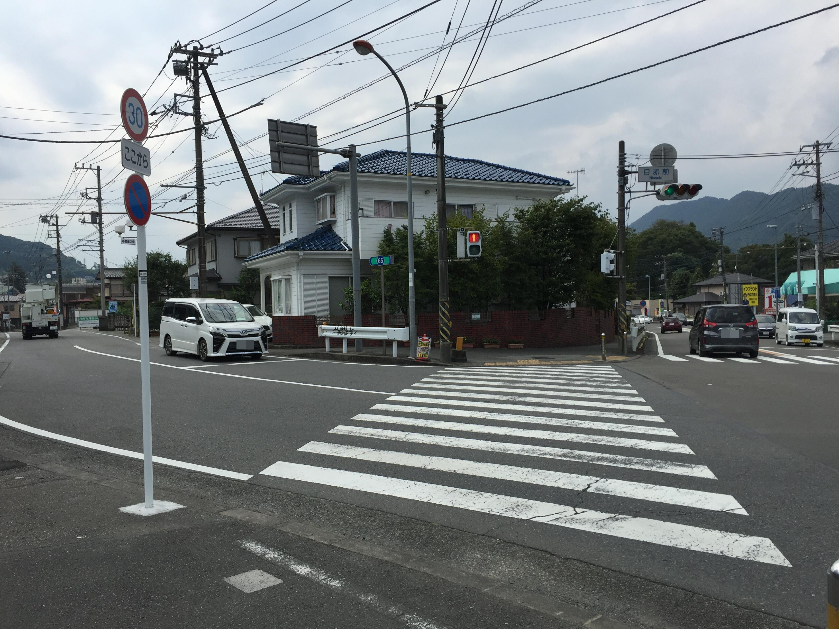 国道413号・日赤前交差点（相模原市緑区中野）。左方向が旧津久井街道（県道65号・513号の重複区間）。